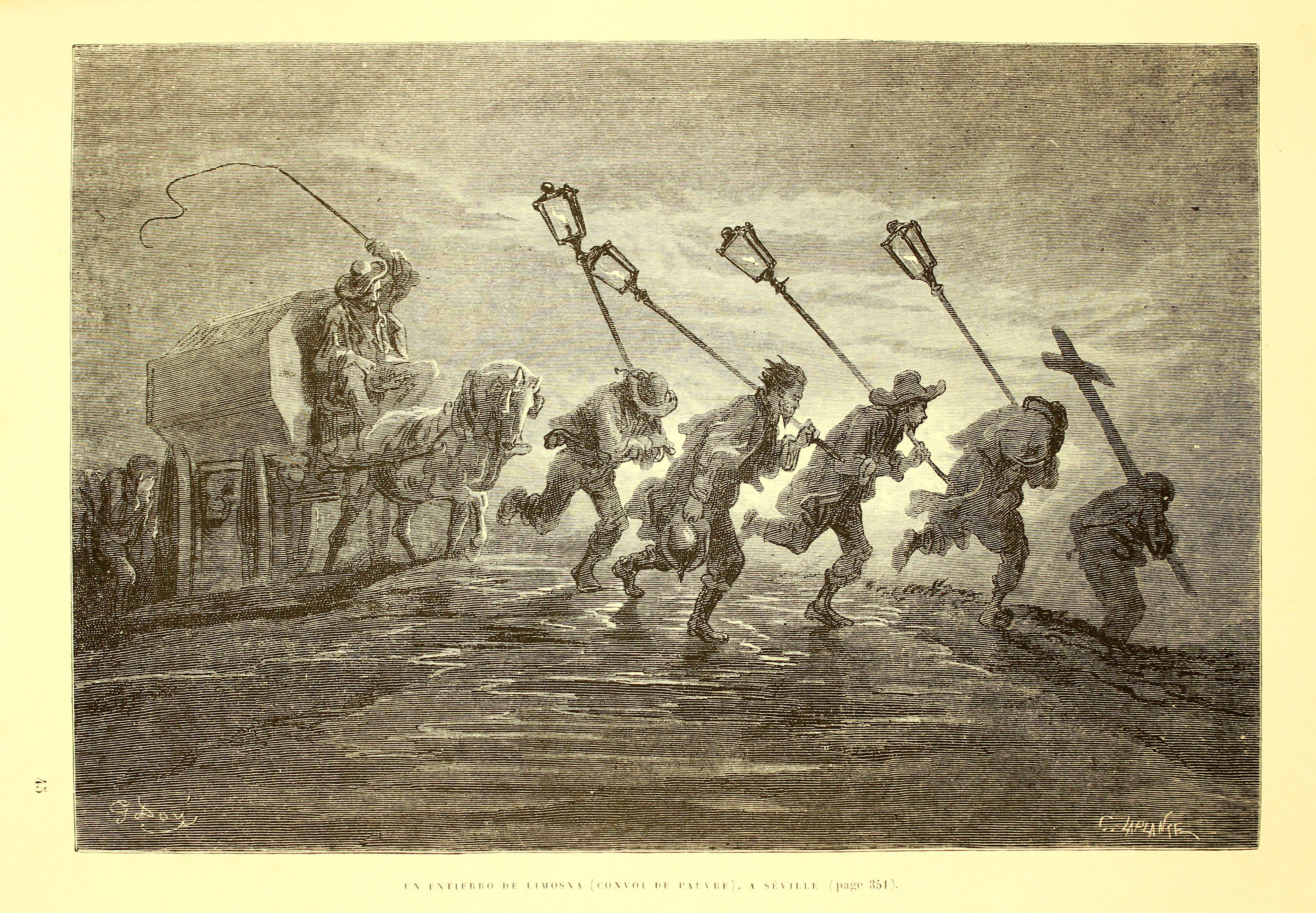 Autor: Davillier, Jean Charles, barón, 1823-1883 Descripción bibliográfica: L'Espagne / par Le Baron CH. Davillier ; ilustrée de 309 gravures dessinées su bois par Gustave Doré. - Paris : Librairie Hachette, 1874. - 799 p. : il. Materia: España- Geografía Materia: España- Usos y costumbres Ilustrador: Doré, Gustave, 1832-1883 Editor: Libreria Hachette Lugar de impresión: Francia, París Localización: Libro completo